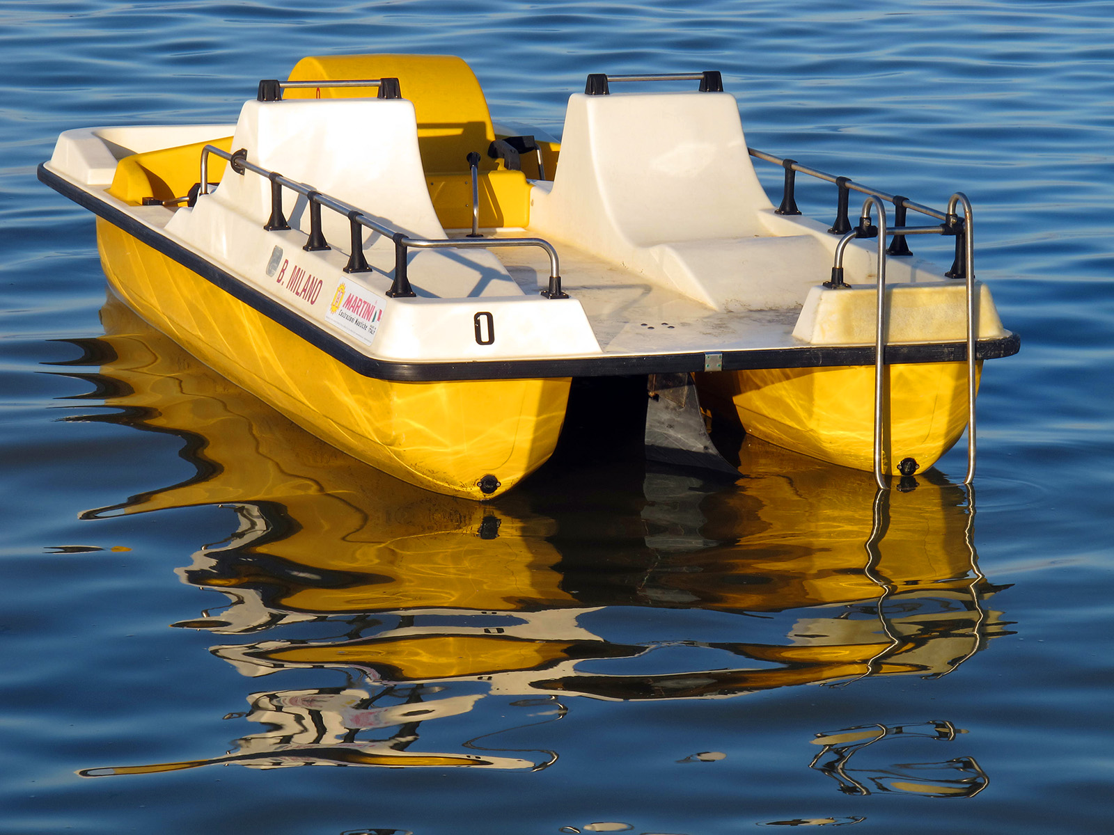 Cesenatico